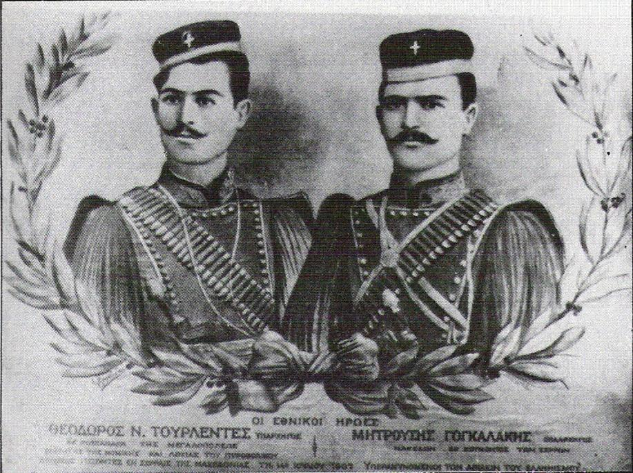 Теодорос Турлендес и Митруш Гоголаков